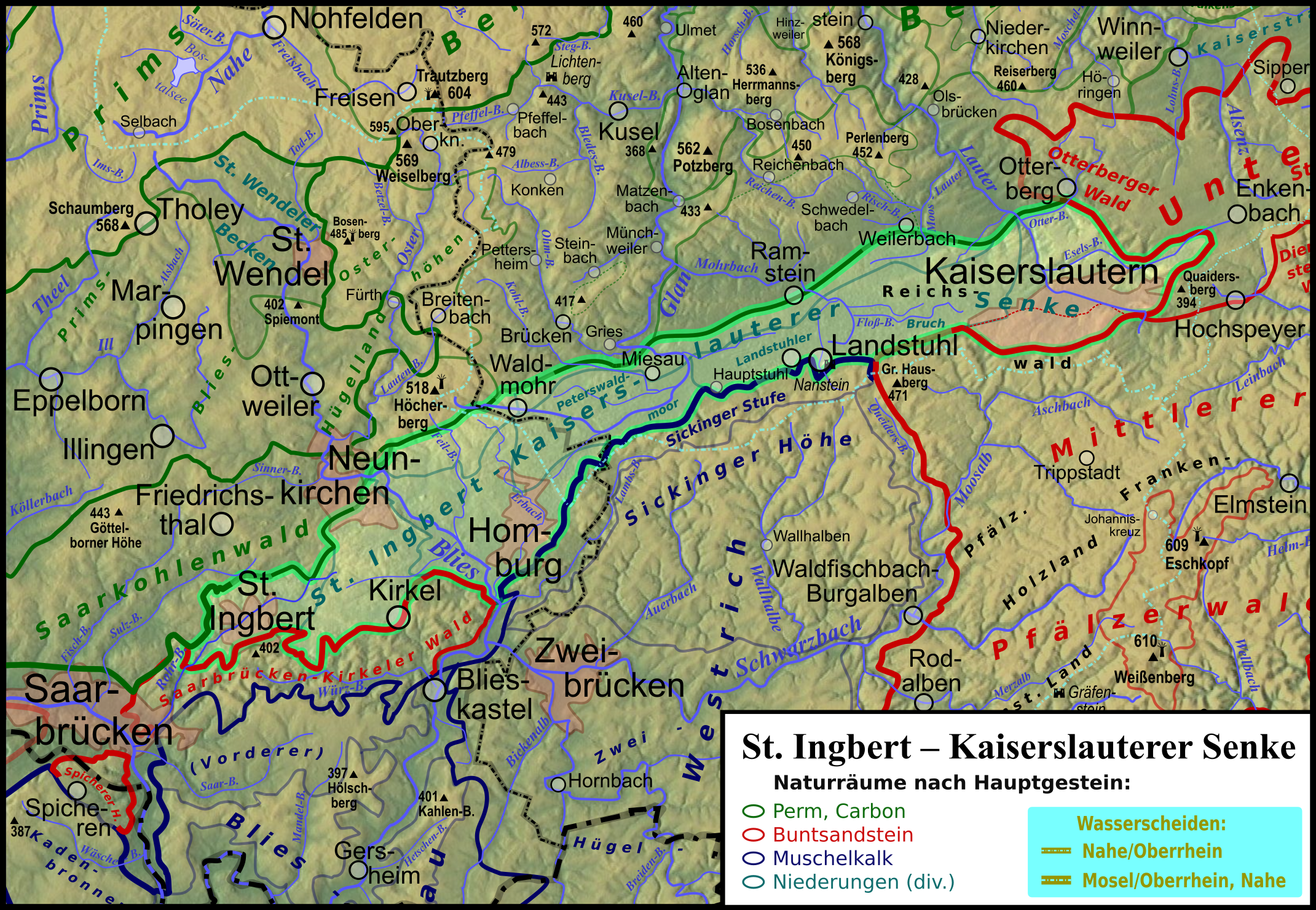 Naturräumliche Karte der St. Ingbert-Kaiserslauterer Senke